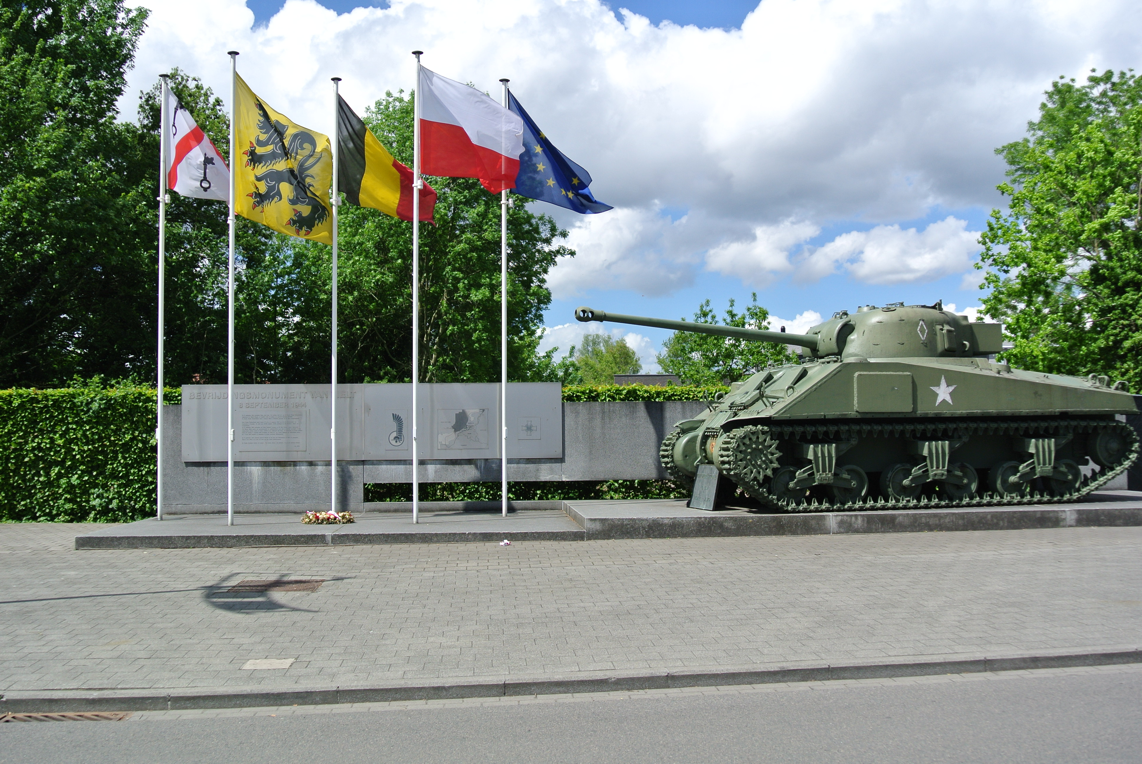 Herdenkingsmonument met Shermantank en gedenkmuur ter ere van de Poolse bevrijders tijdens WOII